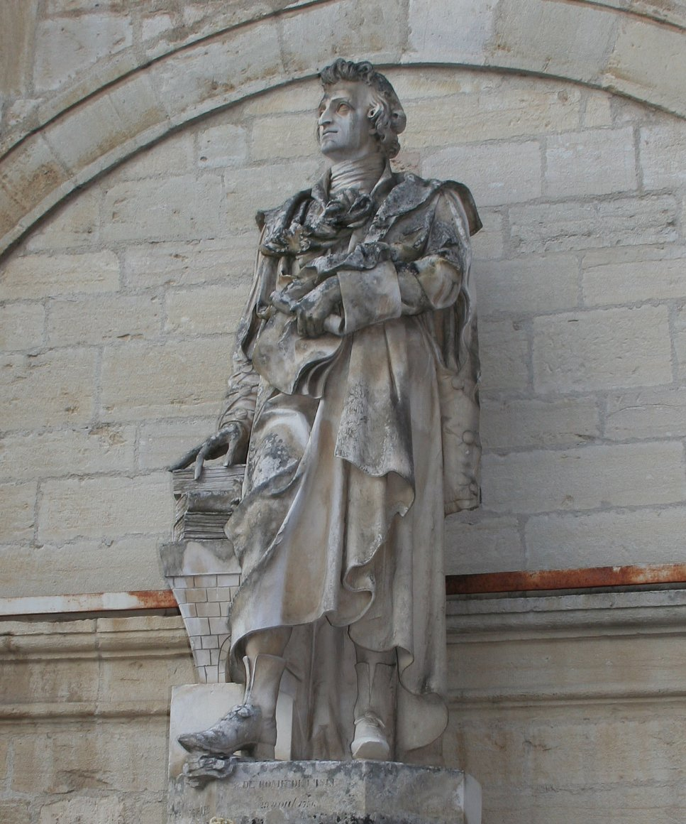 Statue de J.B Romé de L'Isle par Constant Grandgirard 1860 (fontaine adossée à l'hôtel de Ville de Gray).